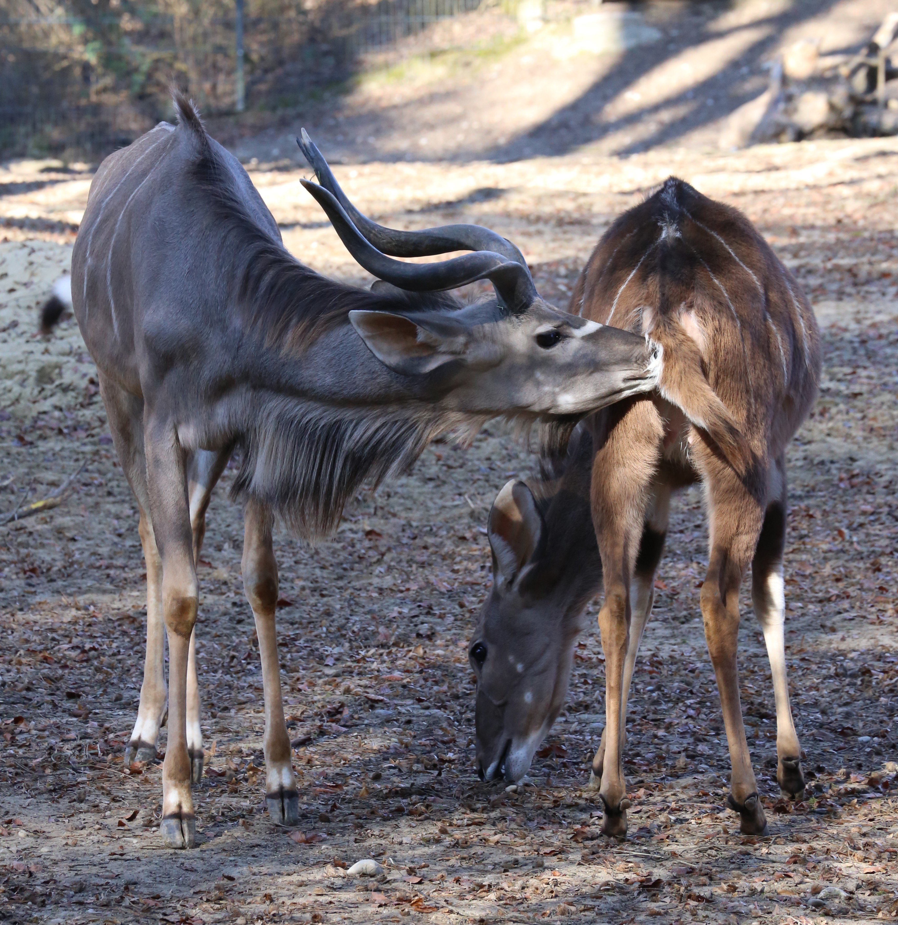 Großer Kudu (Tragelaphus strepsiceros), Tierpark Hellabrunn, München